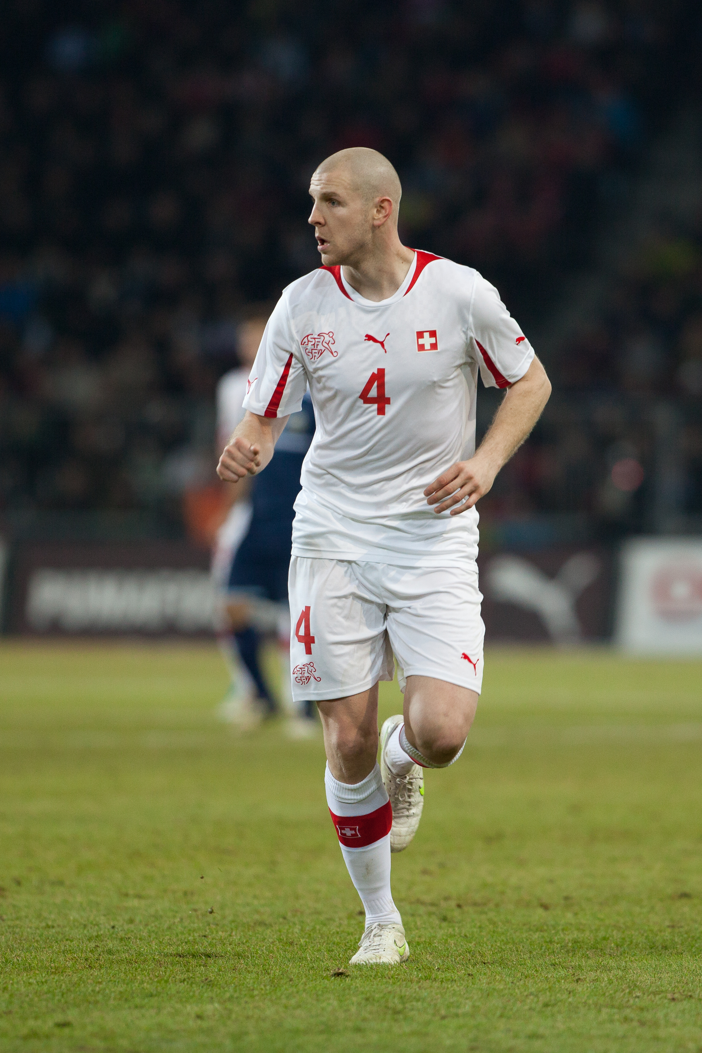 Philippe Senderos